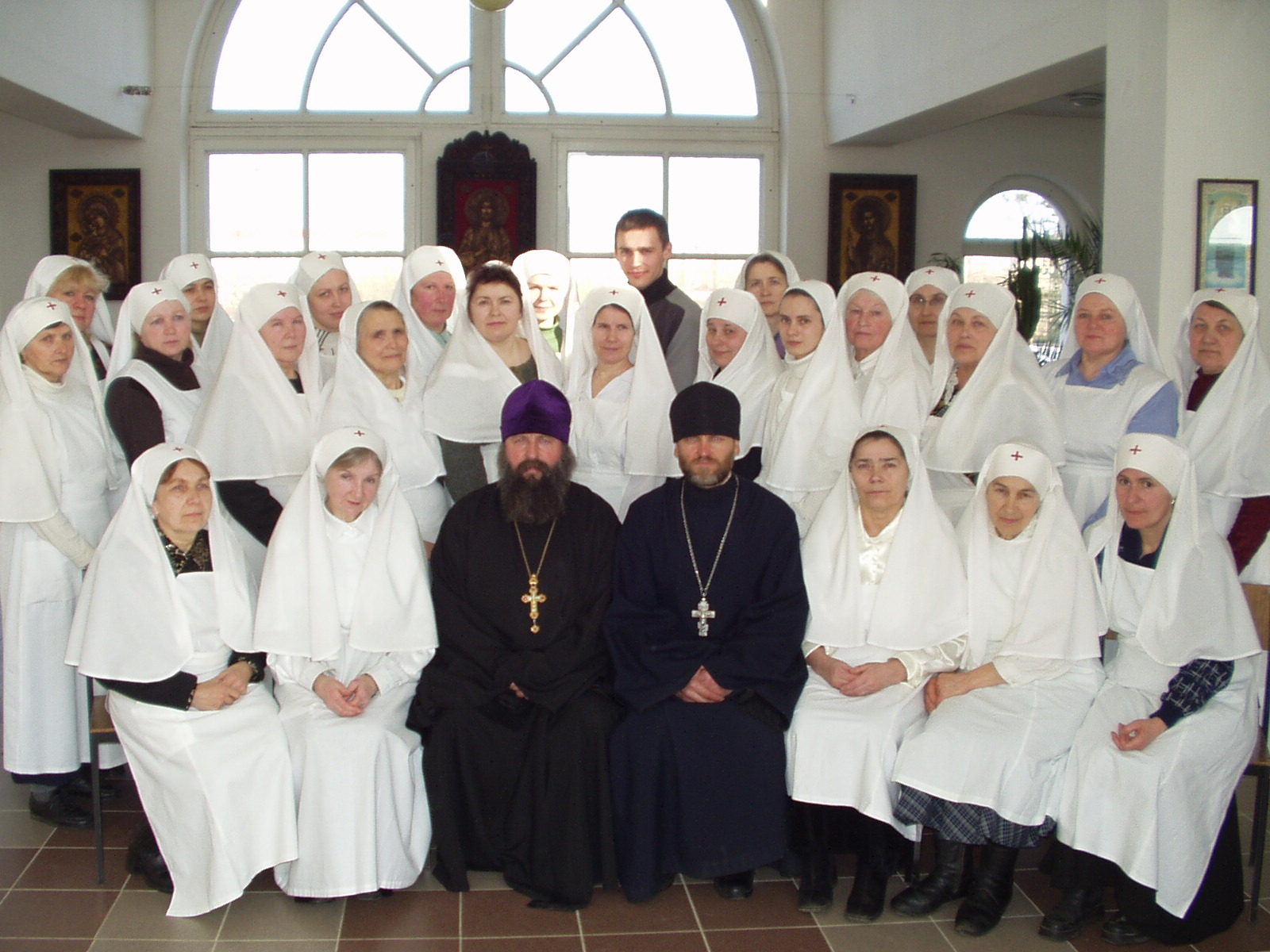 Сестричество милосердия в честь Евфросинии Полоцкой